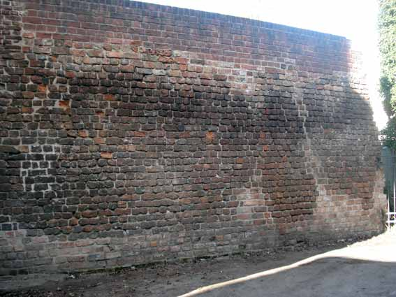 Mauerfragment in der Lindenstrasse der Neustadt Brandenburg an der Havel